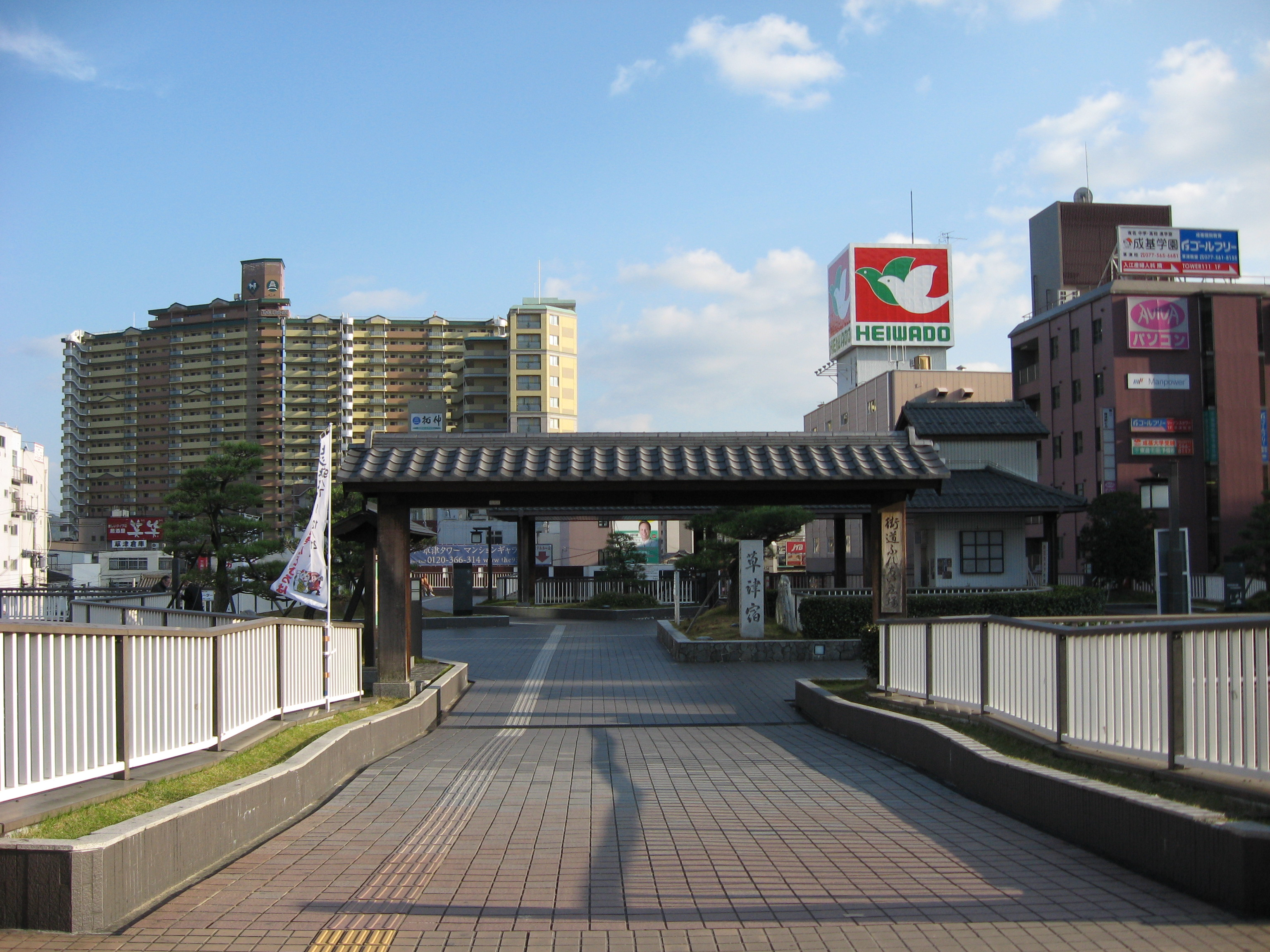 JR Kusatsu Station East Gate View